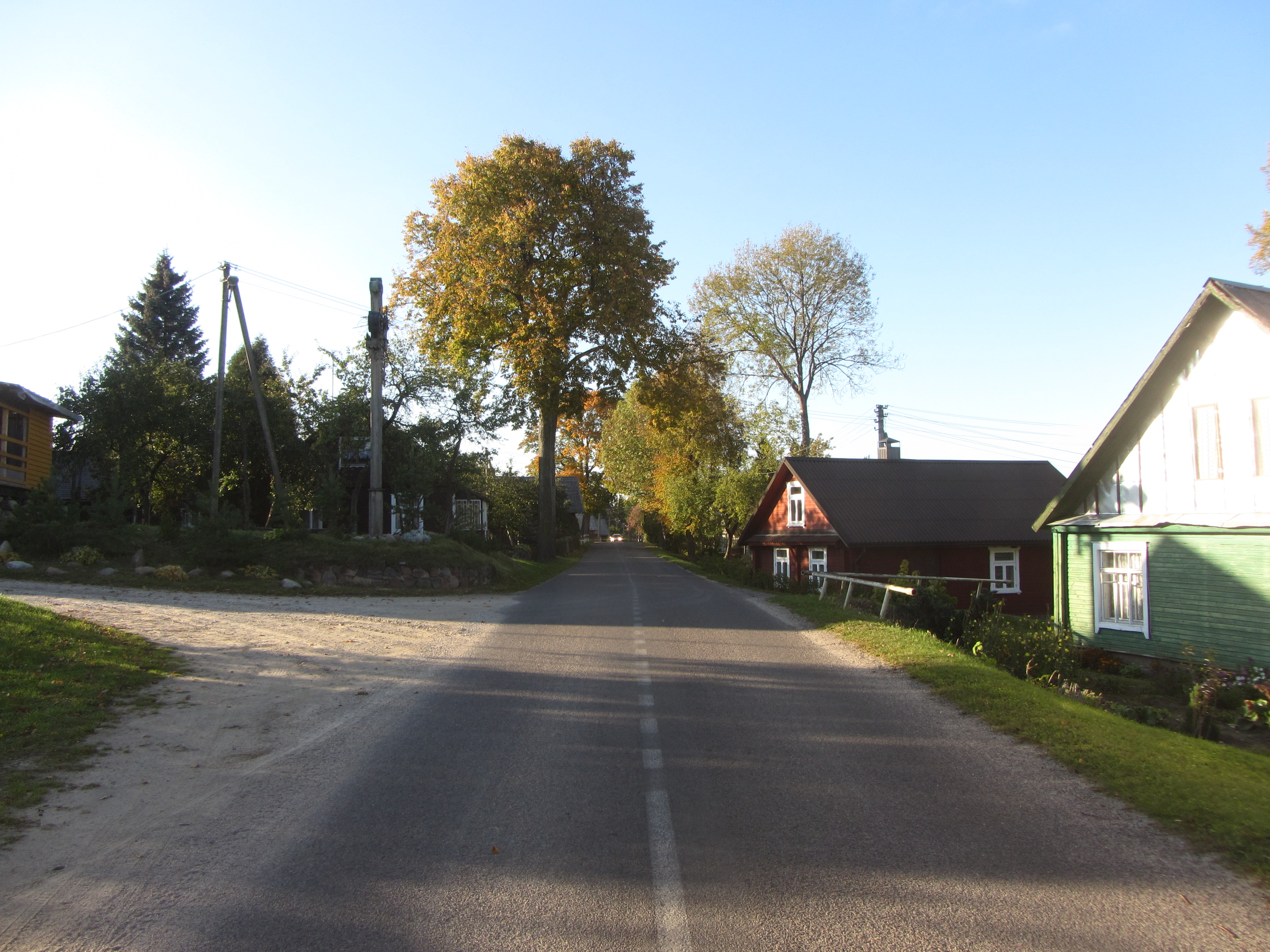 Kirdeikiai, Lithuania